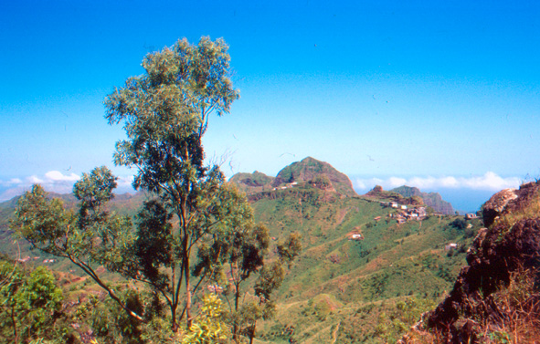 Serra Malagueta. Maio de 2000. OTIMarte